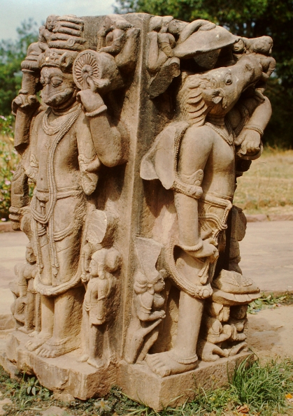 Nachna Vishnu-Avatare